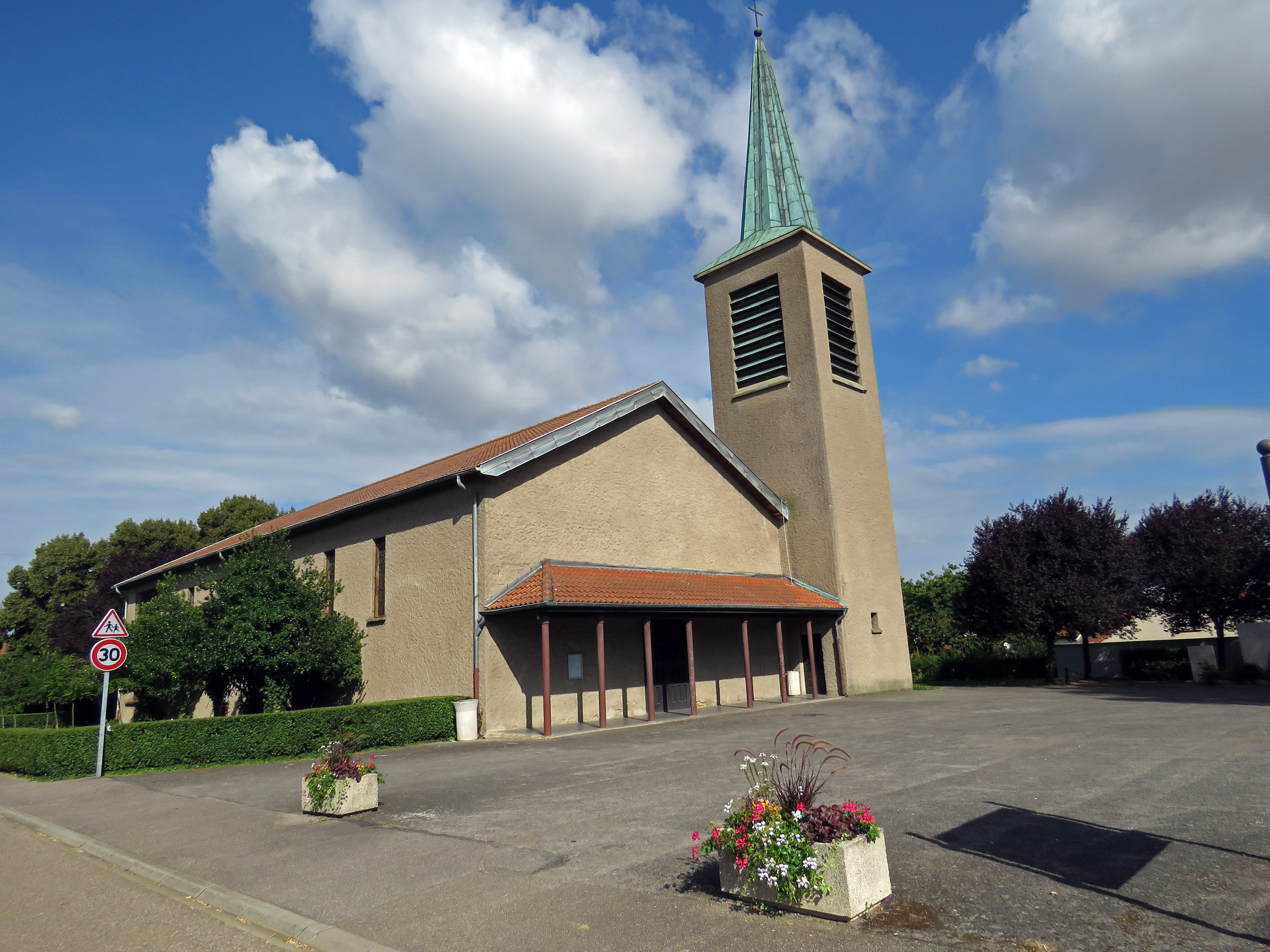 Eglise Saints Côme et Damien de Louvigny Moselle